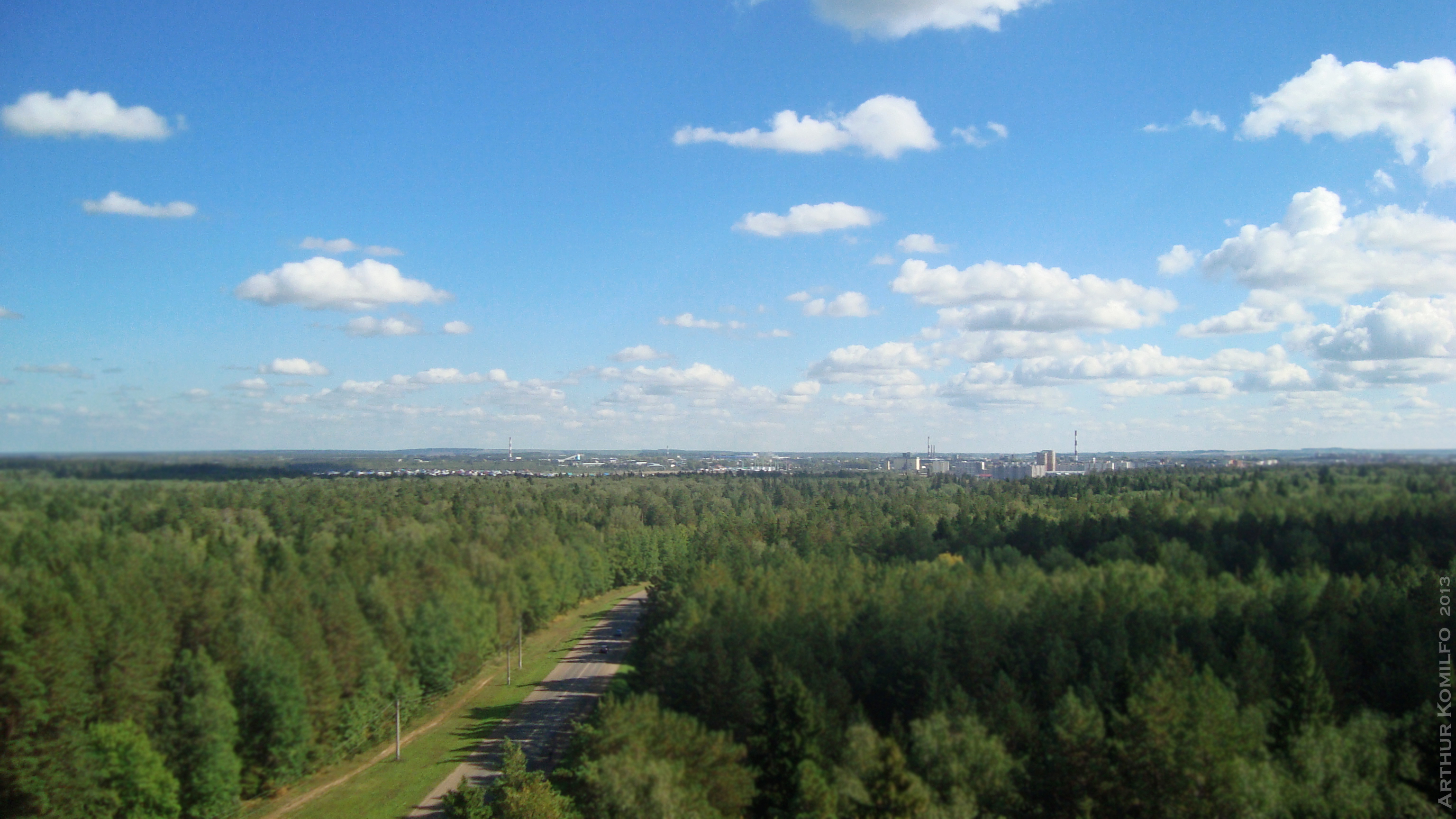 Панорама Нефтекамска со стороны Николо-Березовского шоссе